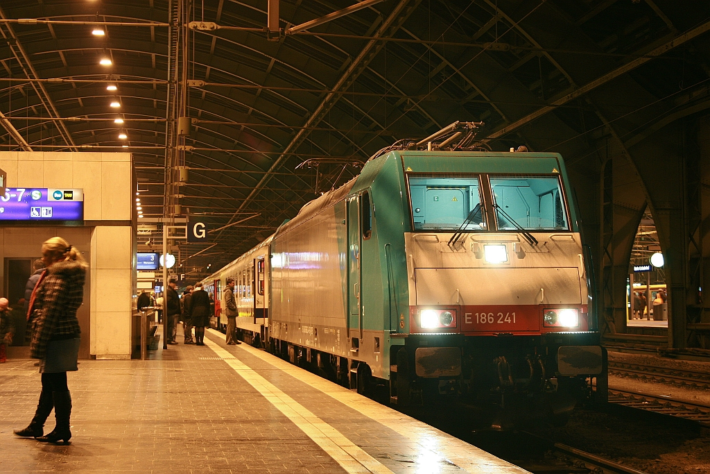 186 241 mit EC 47 in Berlin Ostbahnhof